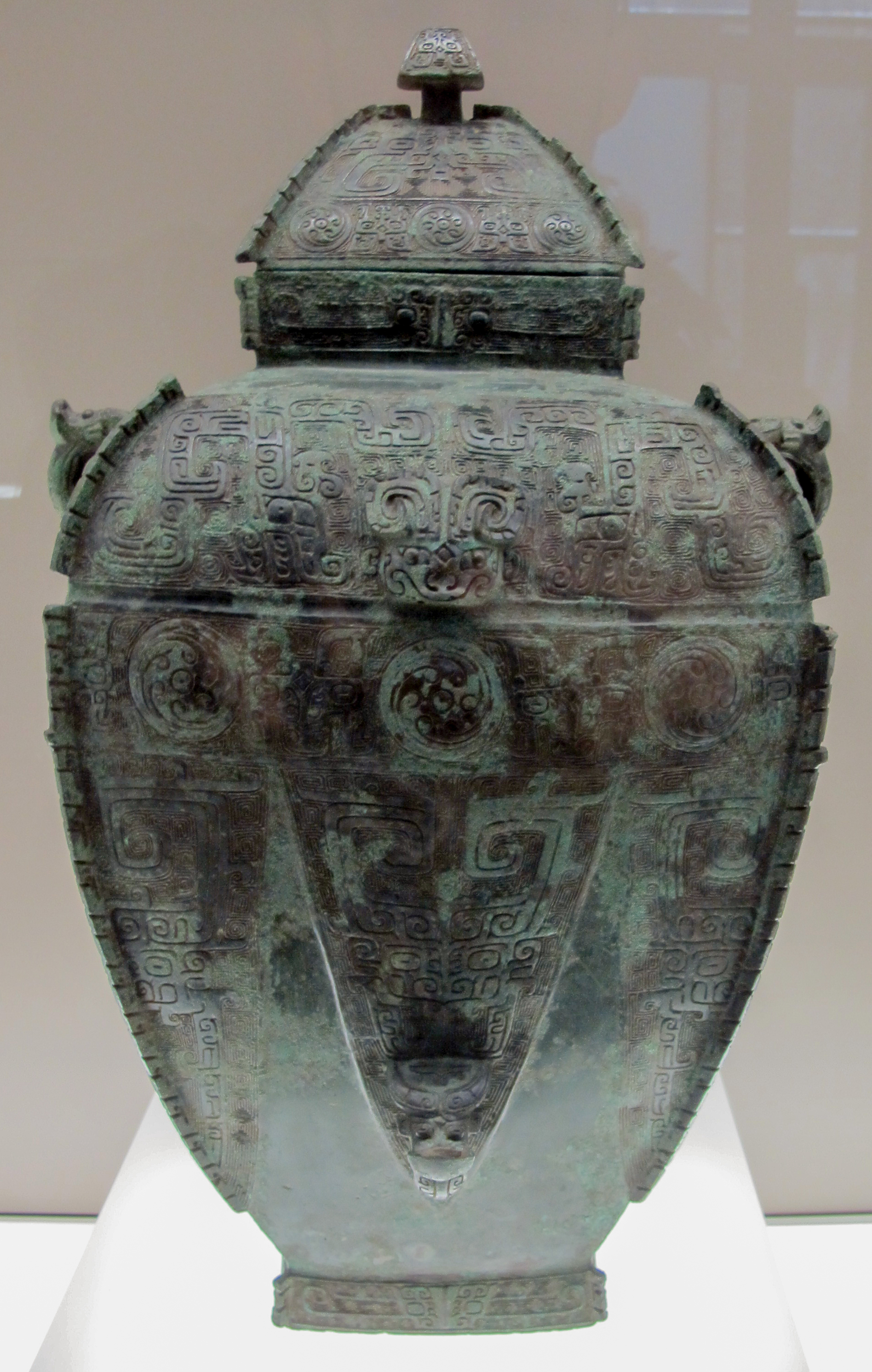 Vase fanglei. Époque de la dynastie Shang (1570 – 1045). 12e siècle. Bronze, H. 48.3 cm. Musée Cernuschi. M.C. 2000-9. Donation, Société Airbus. Référence: site Musée Cernuschi: [1]